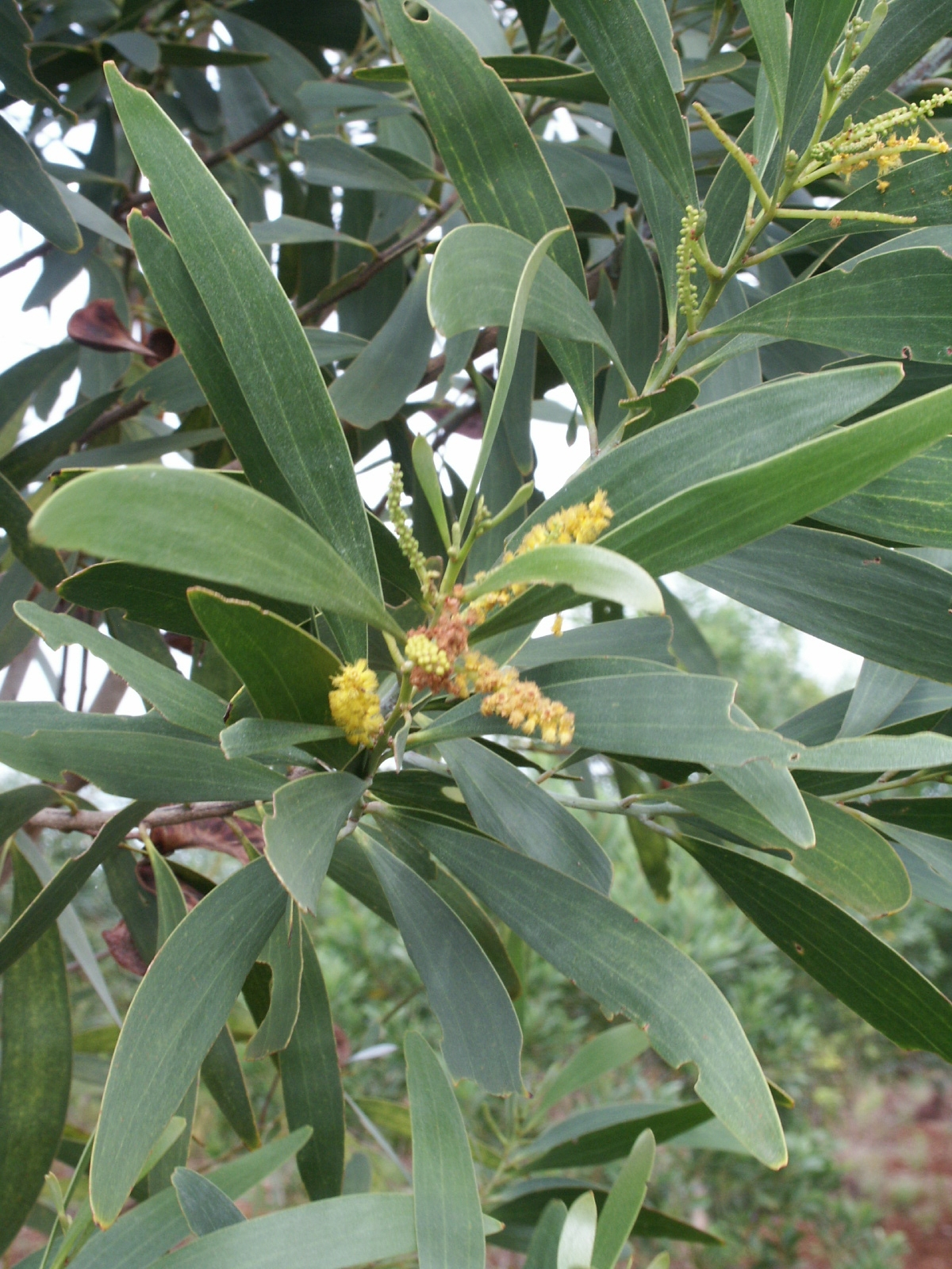 Fleurs et feuilles d'Acacia spirorbis - Faux-gaïac - Iles des Pins (plantation de santal).